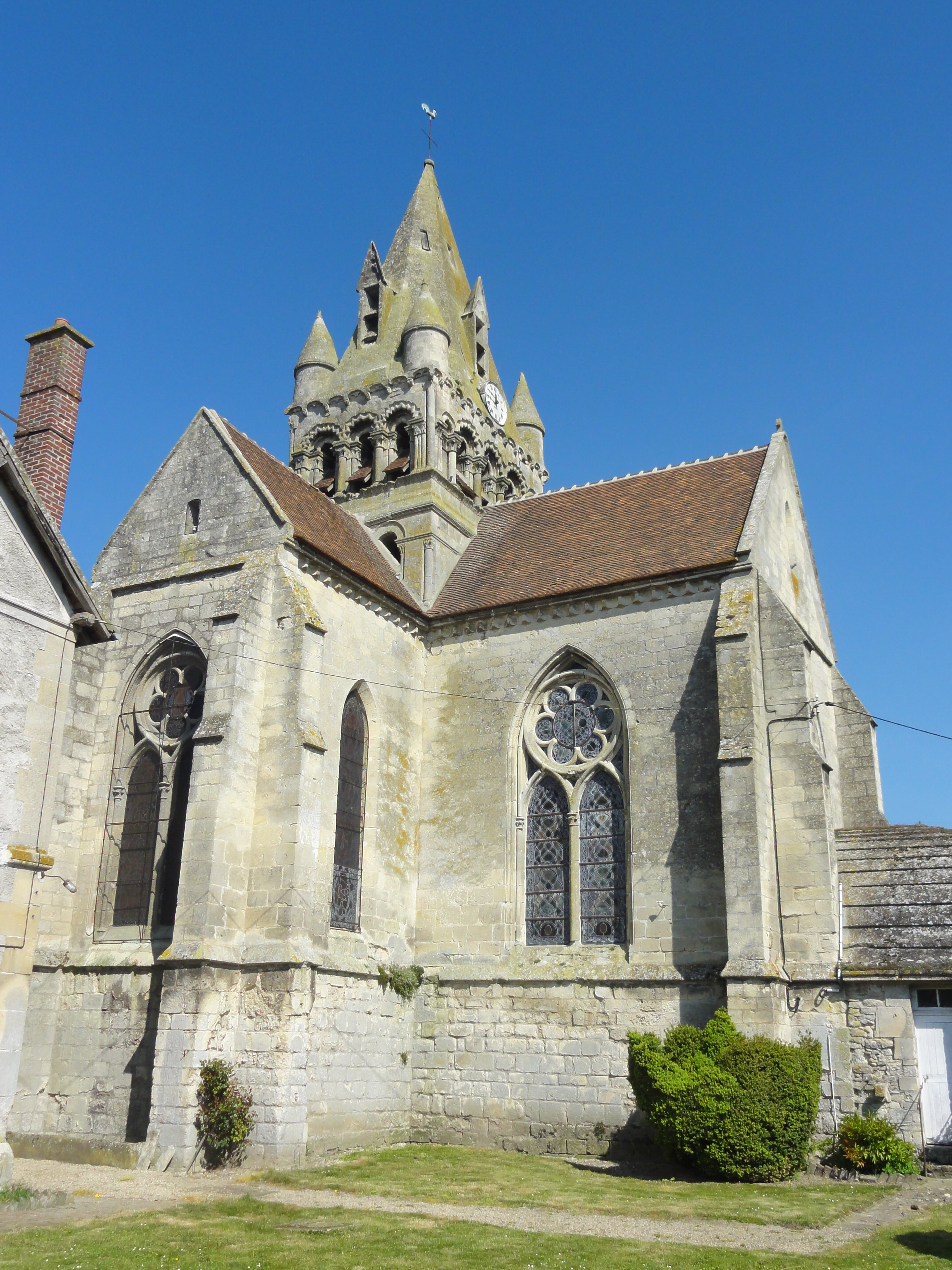 Croisillon sud et chœur, vue depuis le sud.